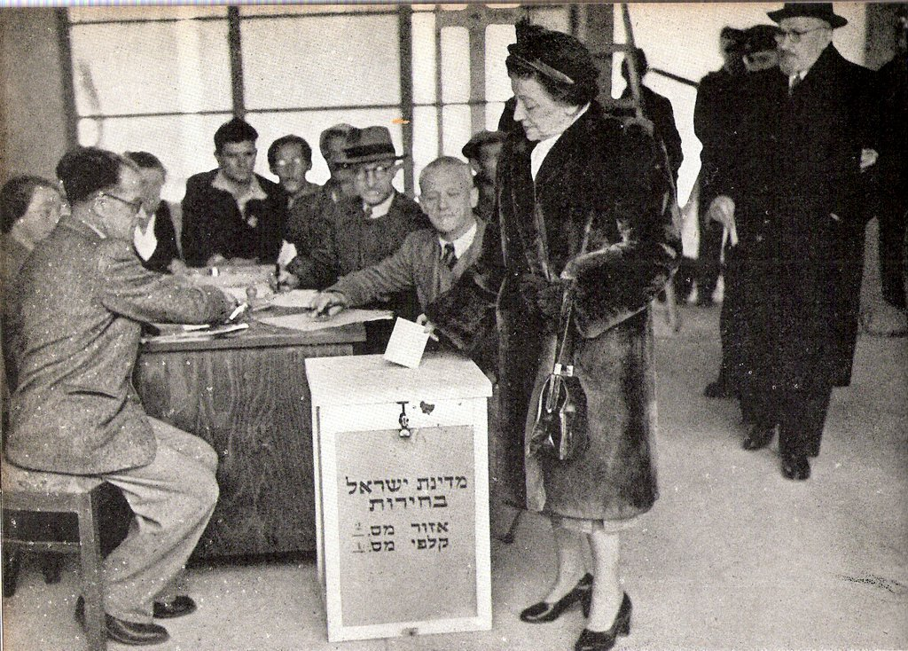 he:ורה ויצמן מצביעה בבחירות הראשונות בישראל, מאחוריה הנשיא he:חיים ויצמן